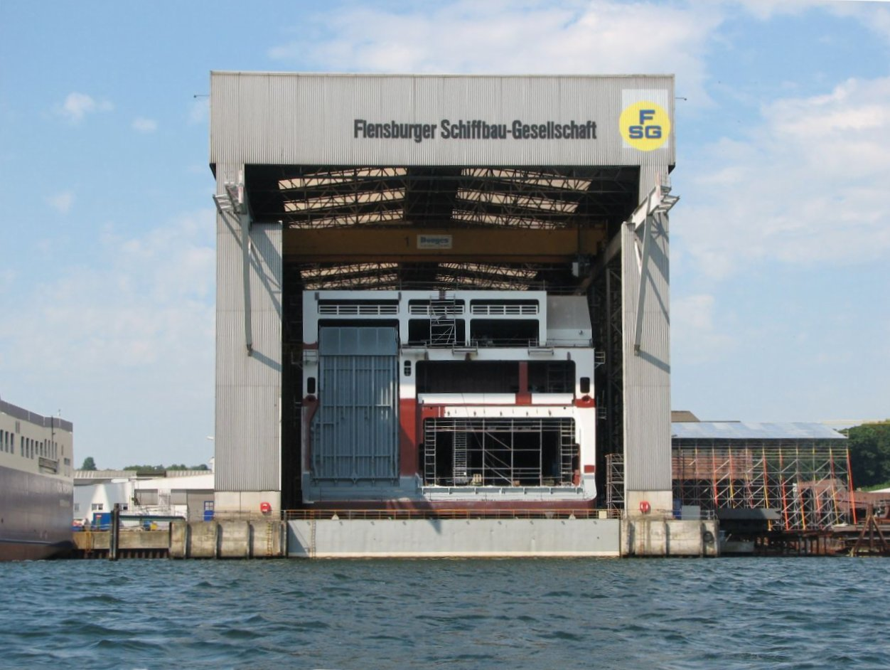 Flensburger Schiffbau Gesellschaft